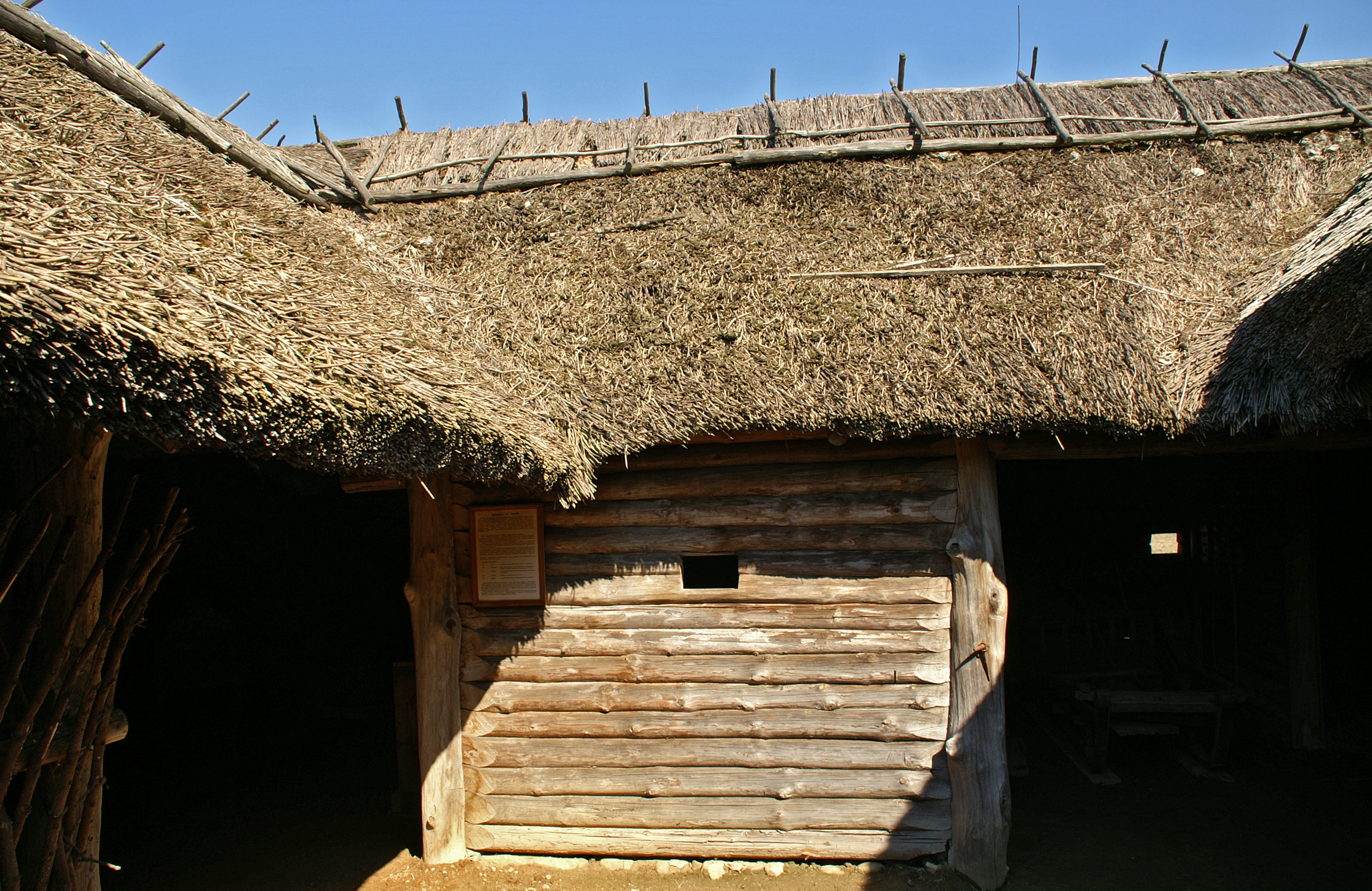 Беларуская (тарашкевіца): Вяночны двор зь в. Волева Дубровенскага раёну Віцебскай вобласьці. в. Азярцо This is a photo of Belarusian heritage monument. Reference number: 612Г000401 ( WLM)